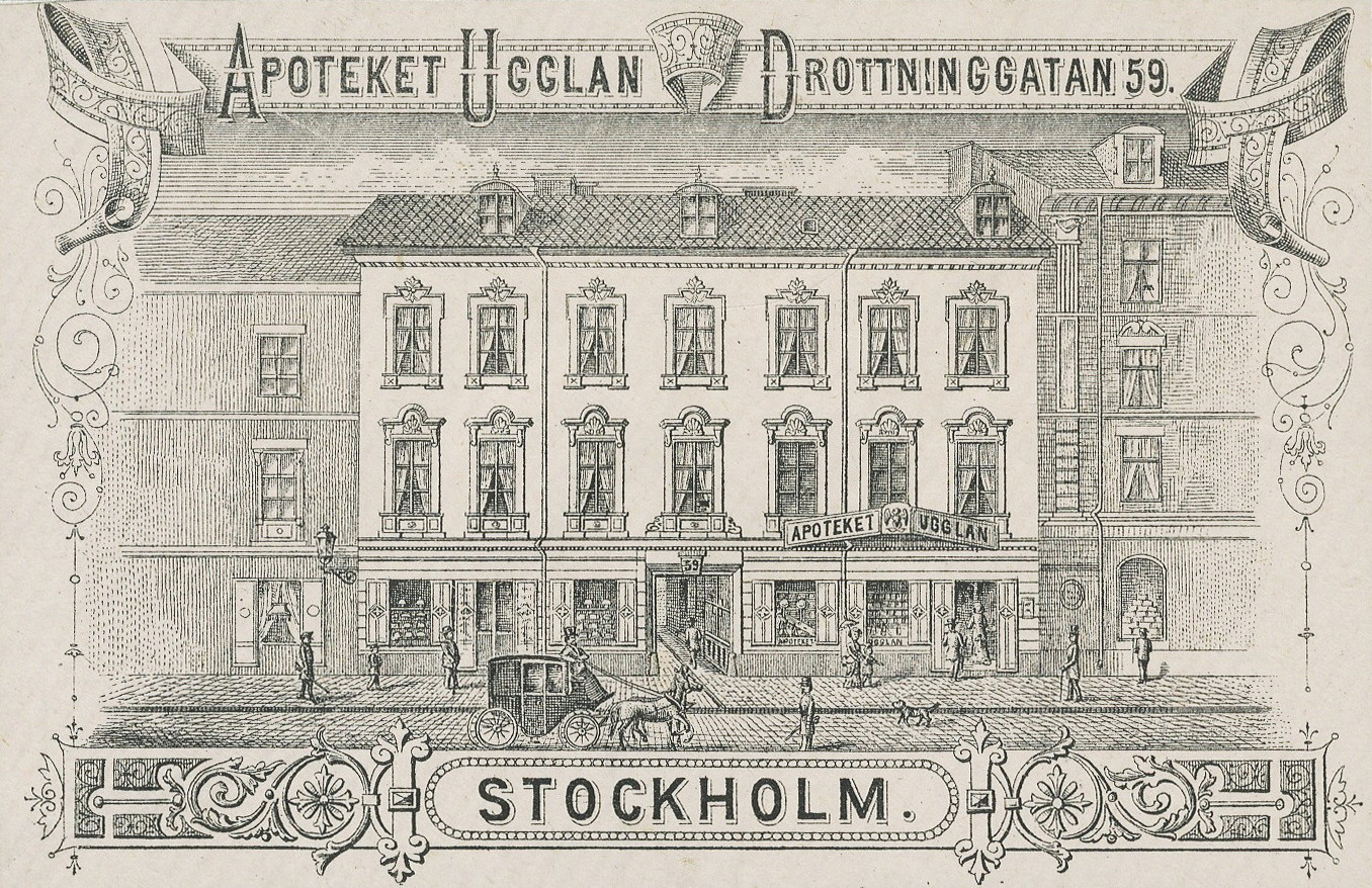 Reklam för Apoteket Ugglan, Drottninggatan